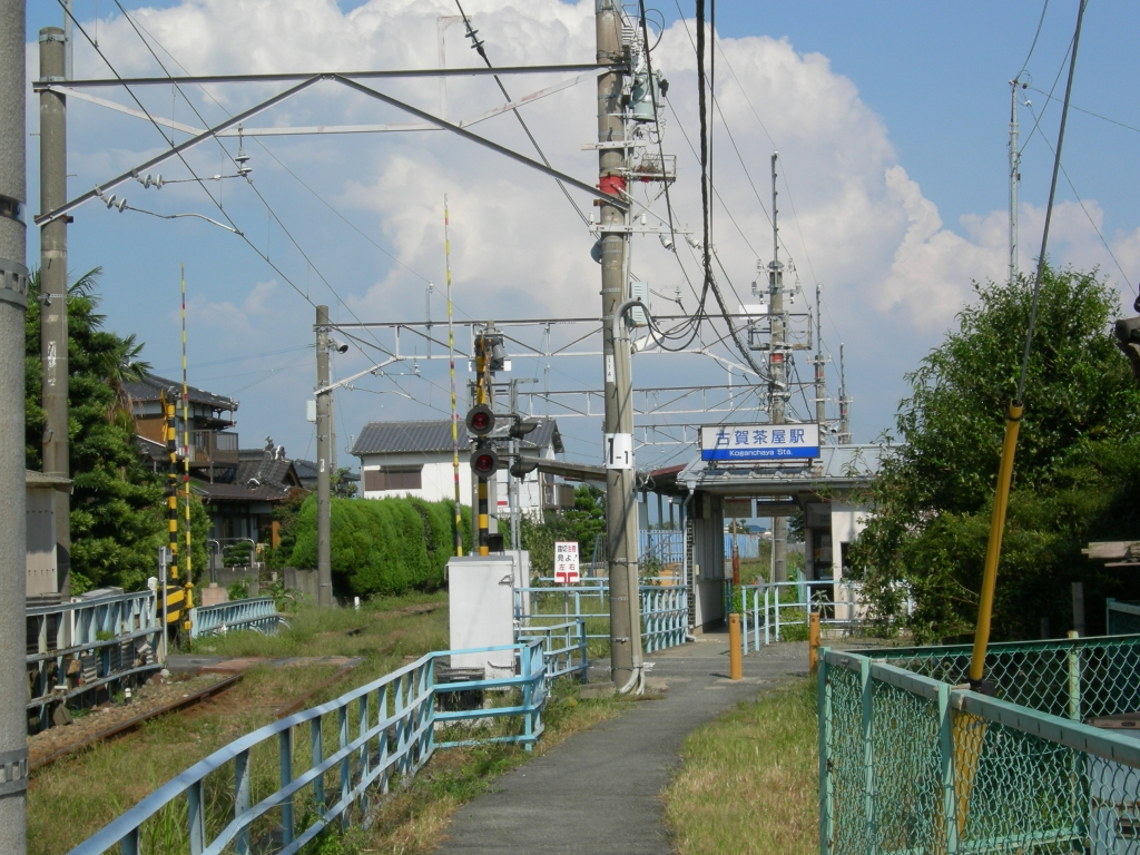 古賀茶屋駅（2006年9月自身撮影）